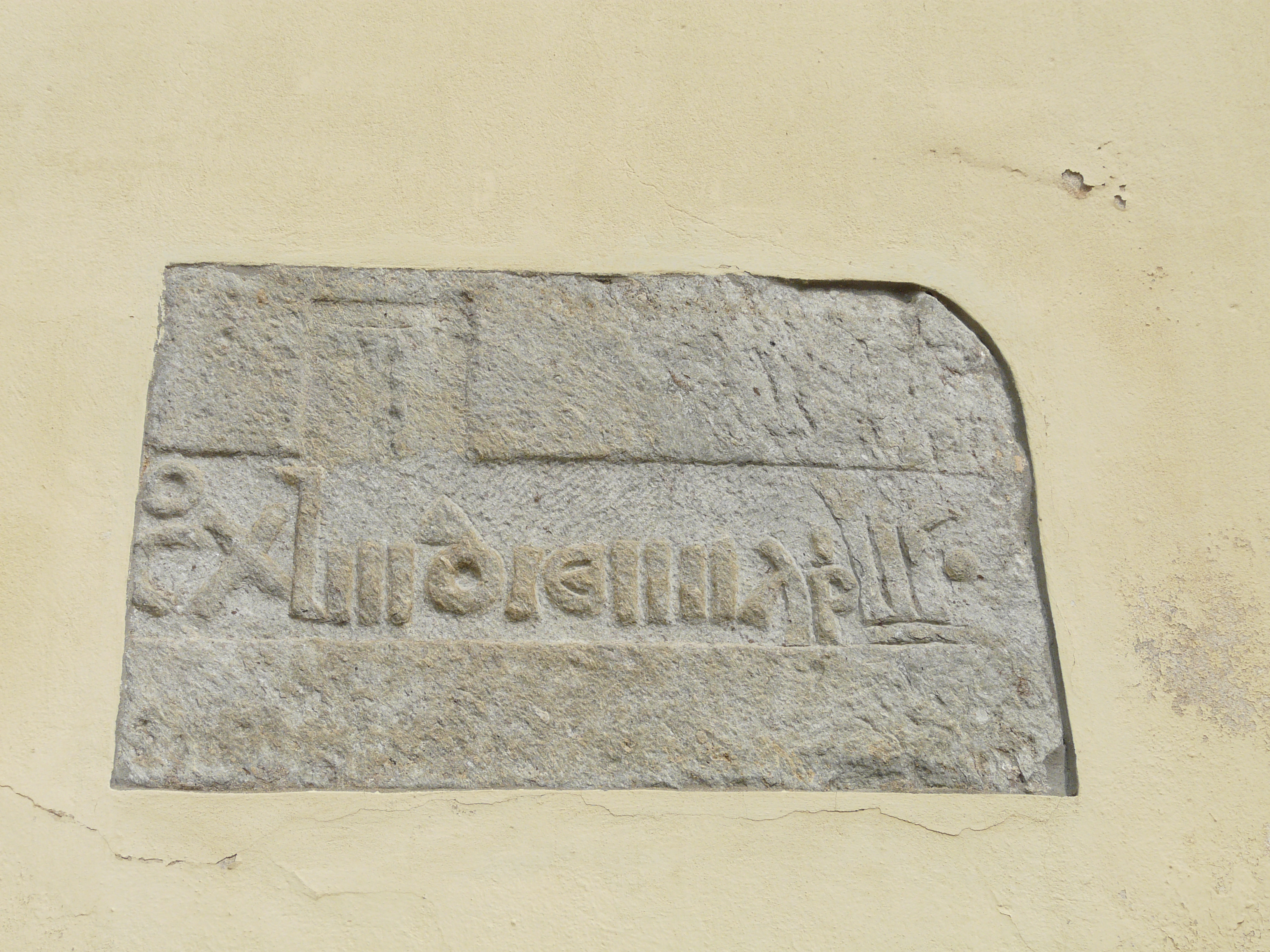 Chiesa di Sant'Antonio abate, Magliolo, Liguria, Italia